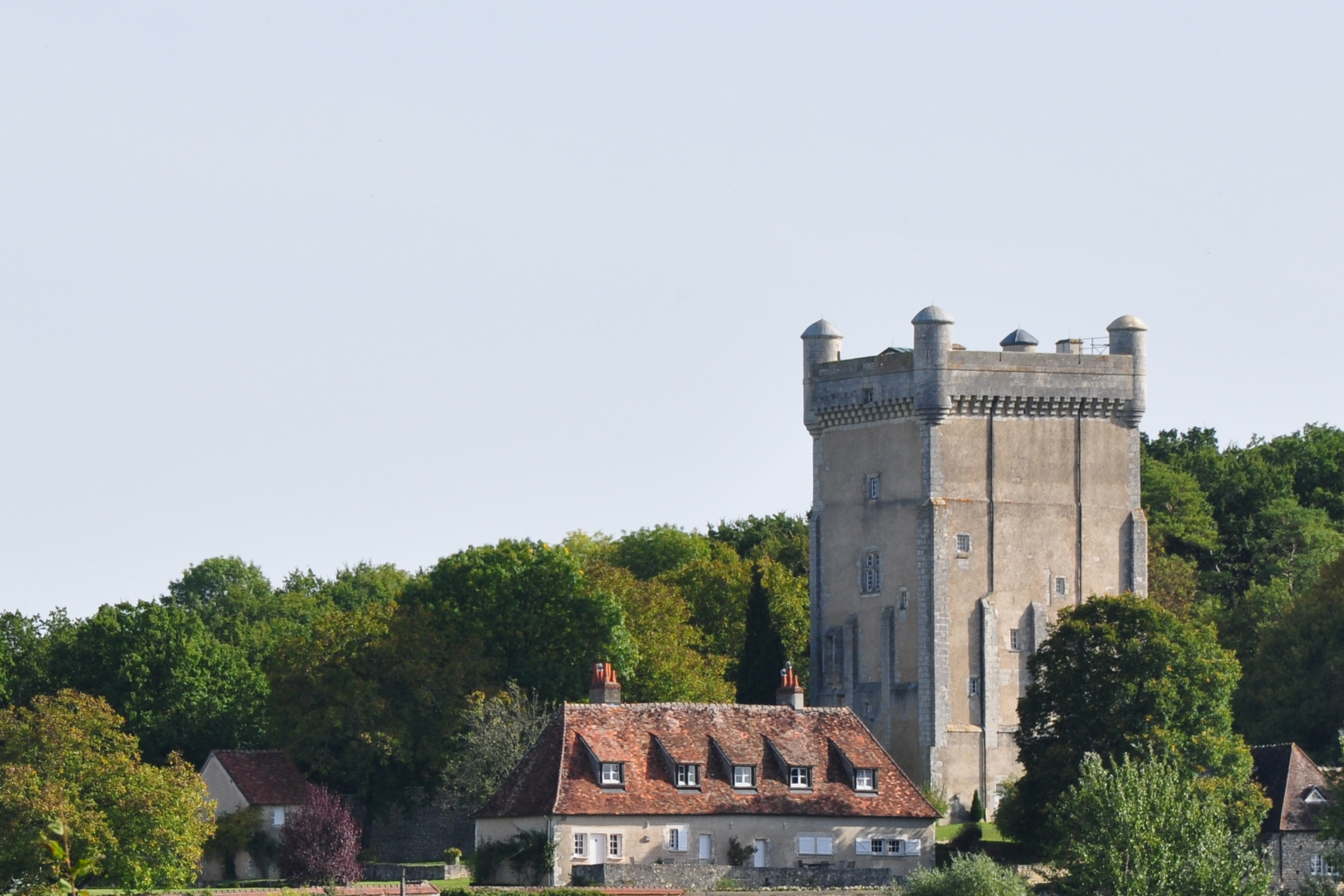 Château de Prunget, à Tendu. .